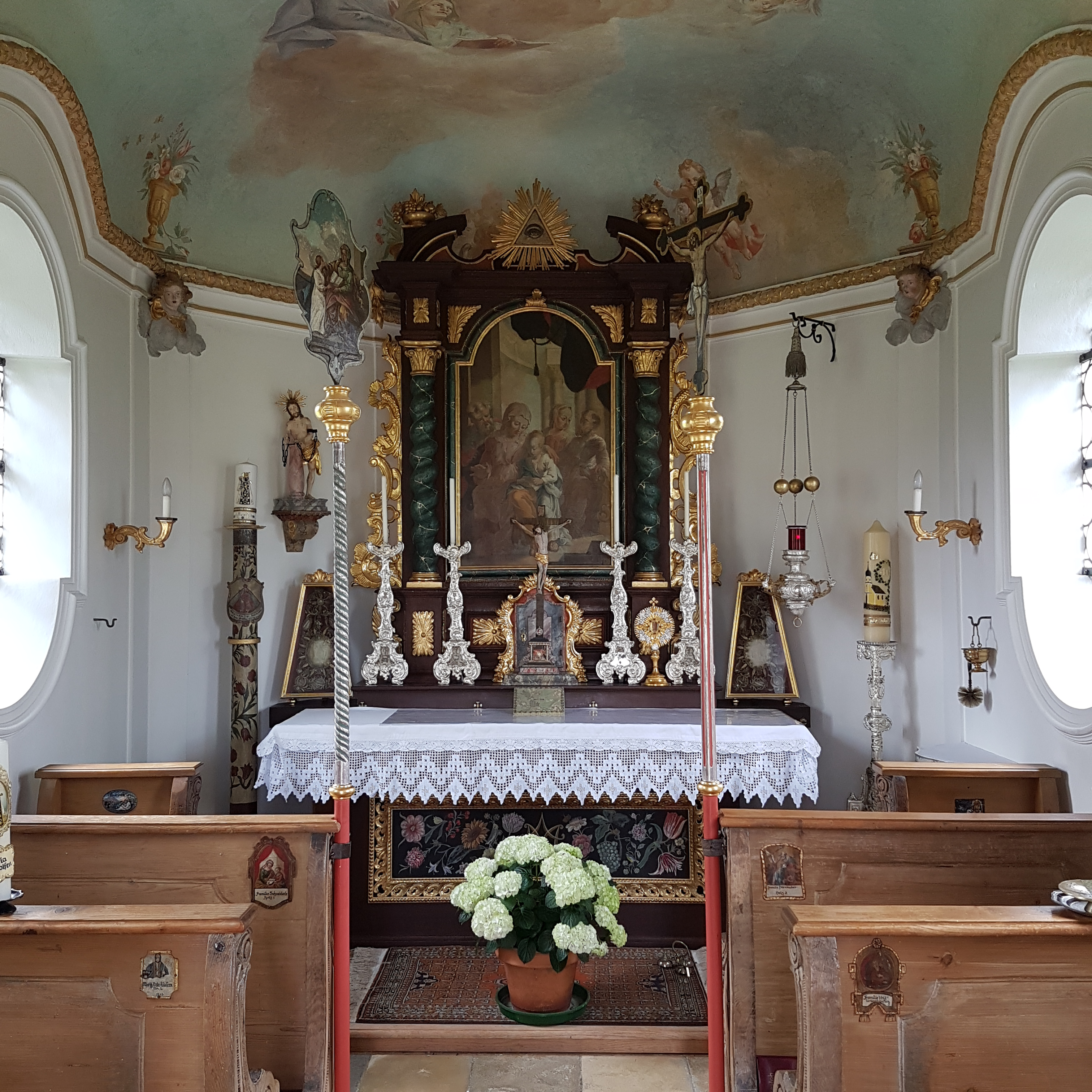 Kapelle